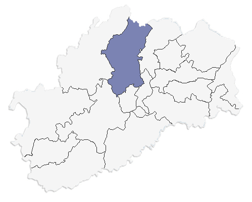 Carte de localisation du nouveau canton de Port-sur-Saône (70)